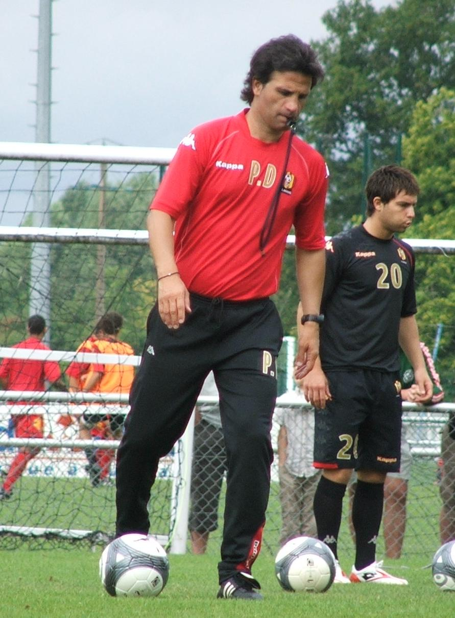 Paulo Duarte, ancien élève de José Murinho, ici en plein coaching avec Mathieu Coutadeur, lors d'une séance d'entrainement au MUC 72 le jeudi 27 Août 2009.